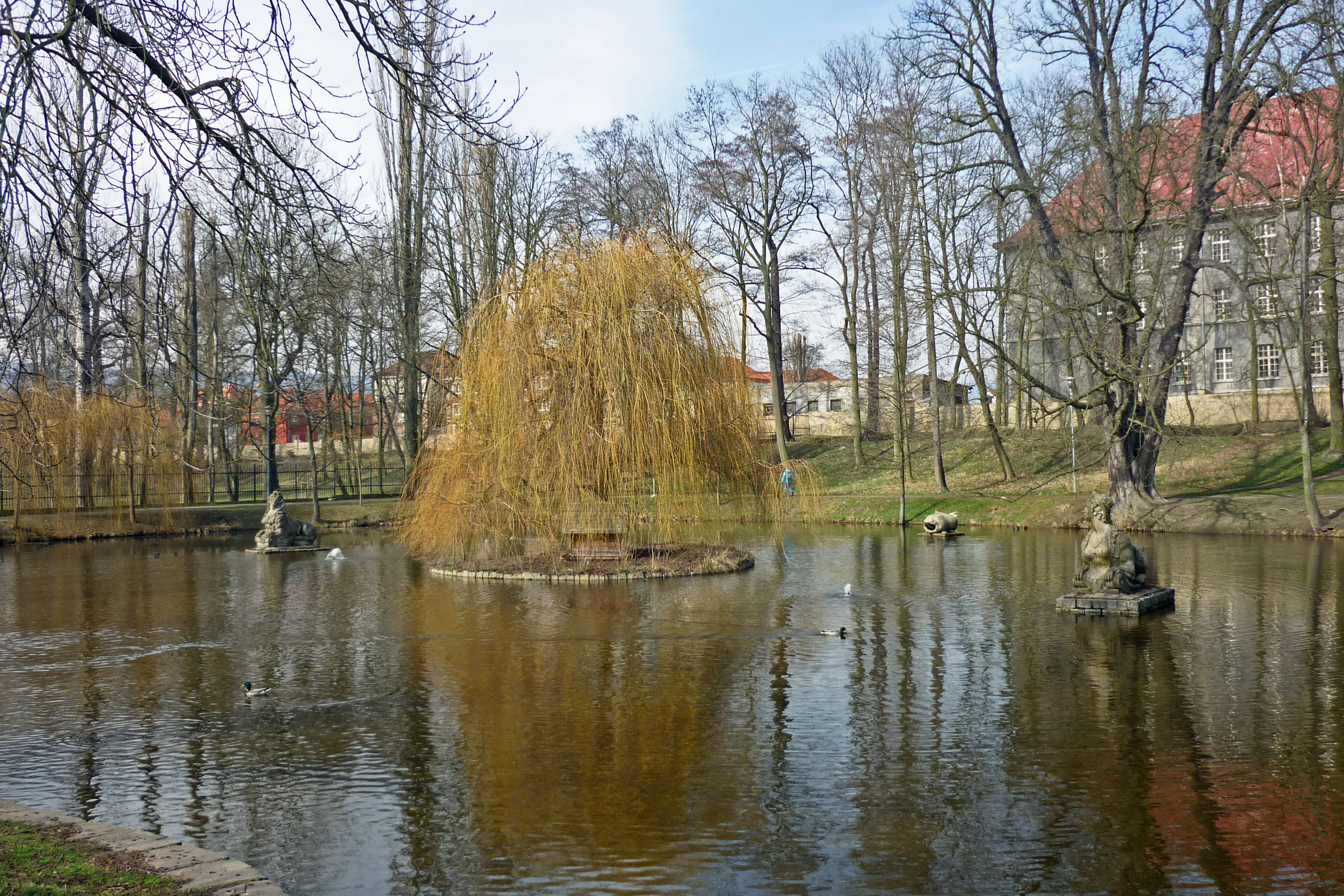 Sphinxteich im Schlosspark Dux (Duchcov)